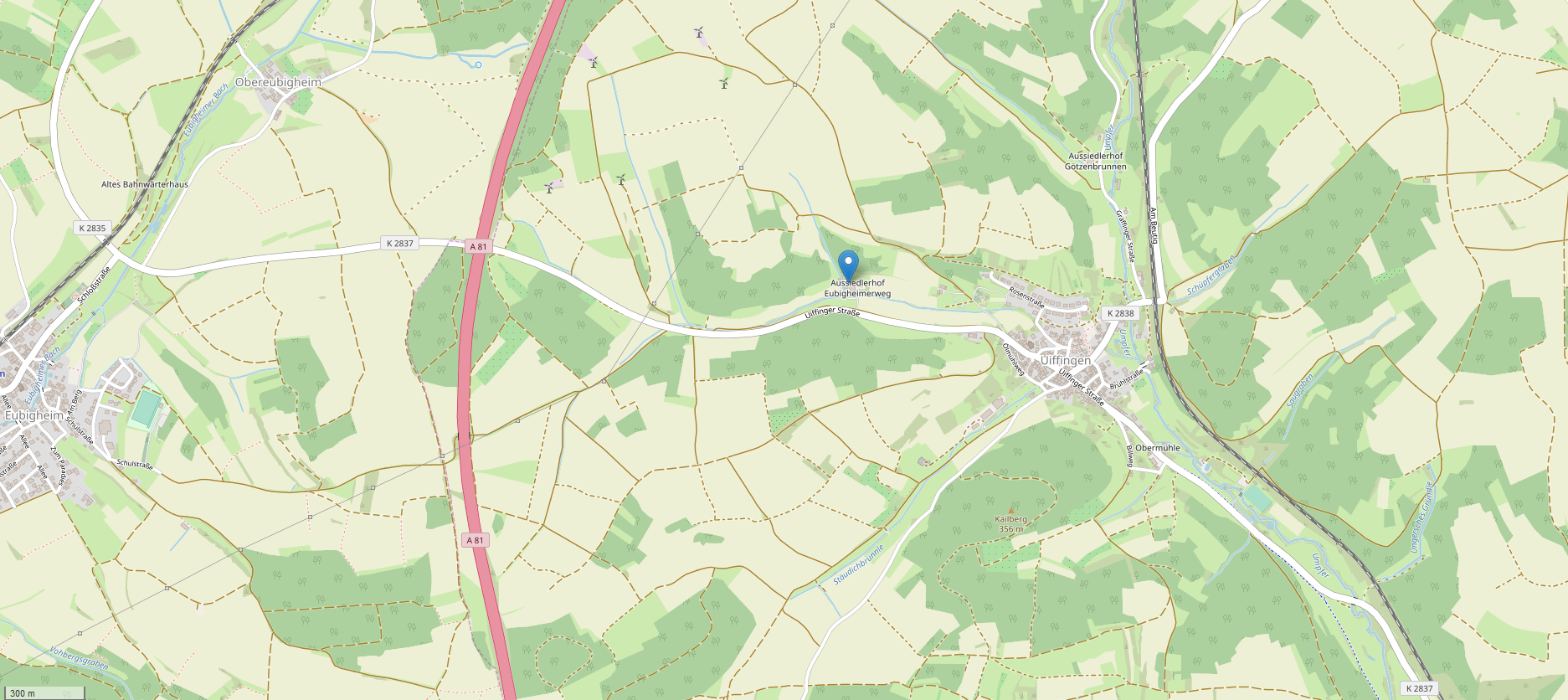 Lage des Wohnplatzes Aussiedlerhof Eubigheimerweg auf der Gemarkung von Uiffingen (Boxberg)